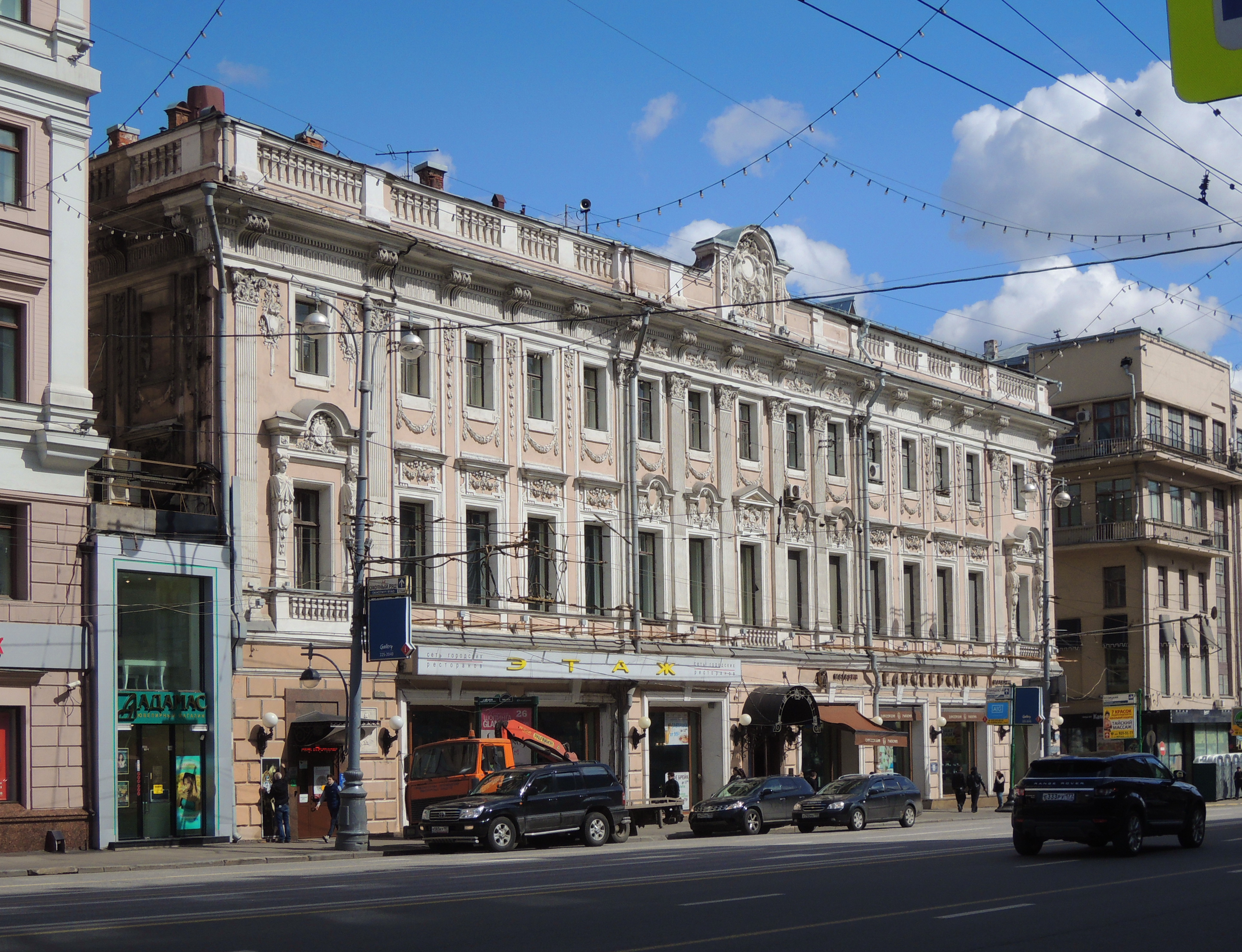 Дом Е. И. Козицкой — магазин Г. Г. Елисеева («Елисеевский»)